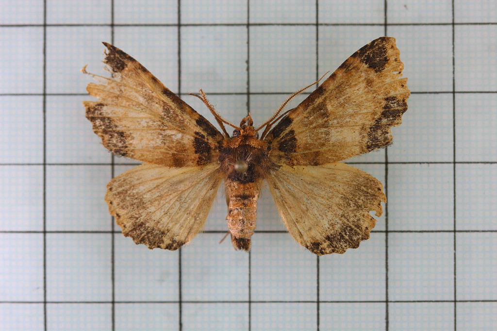 Sypnoides pannosa (Moore,1882) 認識台灣的昆蟲14:p.105